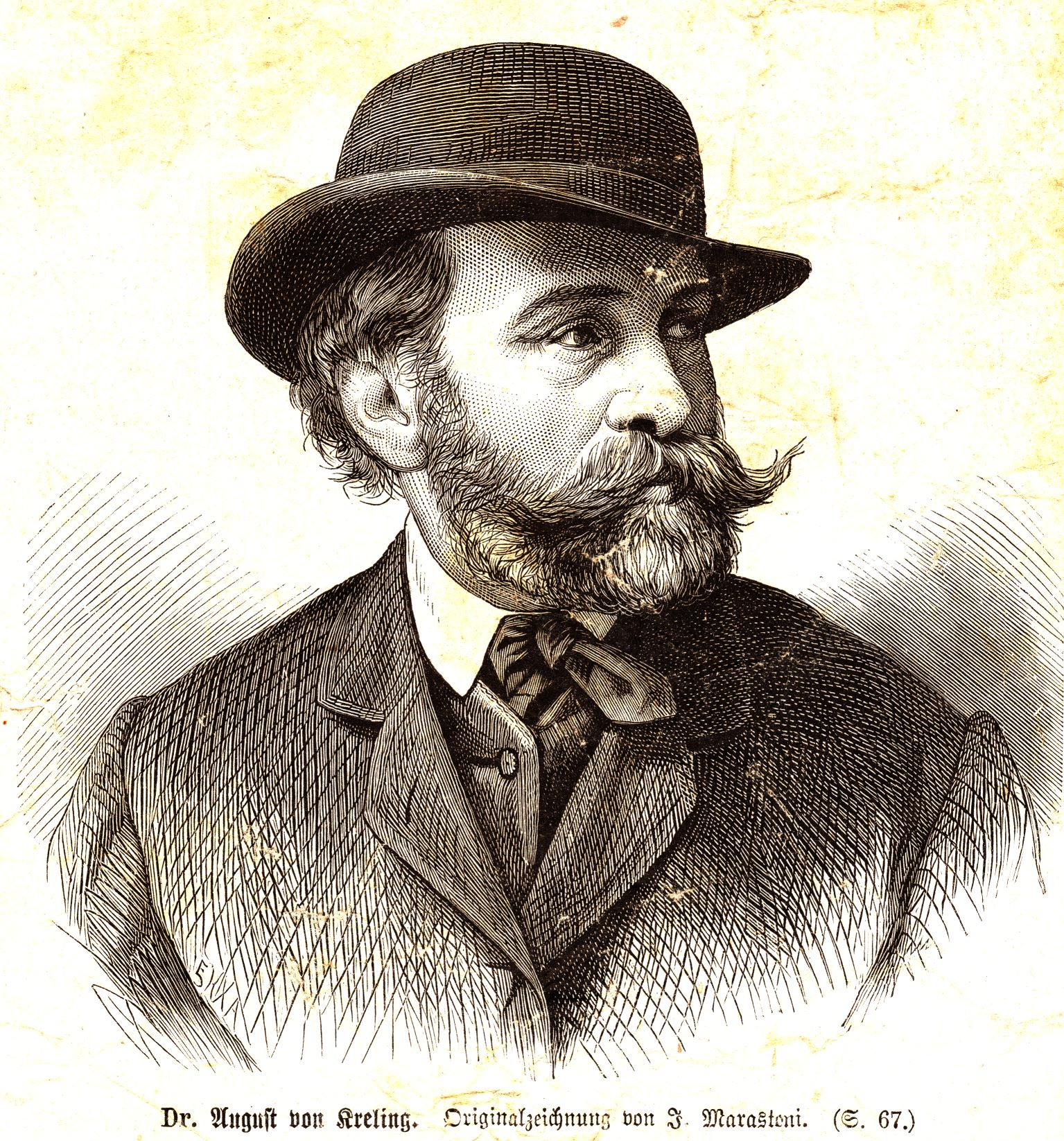 Portrait von Dr. August von Kreling